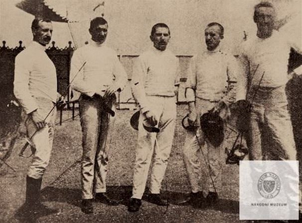 Letní olympijské hry 1908 Londýn, družstvo šermířů, jehož členy byli Vilém Goppold, Bedřich Schejbal, Jaroslav Šourek-Tuček, Otakar Lada a Vlastimil Lada-Sázavský.